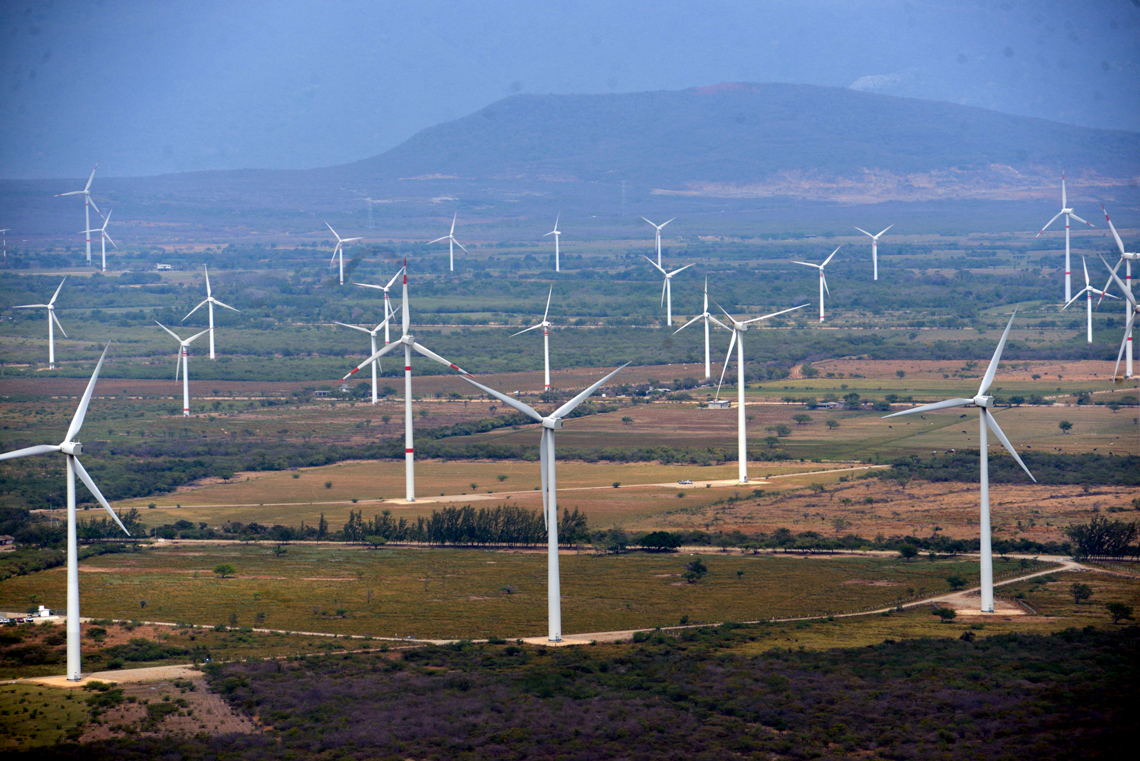 Asunción Ixtaltepec, Oaxaca. El Istmo de Tehuantepec es la región del país con mayor potencial para generar energía eólica; por ello, impulsamos proyectos que fortalecen su infraestructura y detonan su economía. 03 de Marzo del 2016